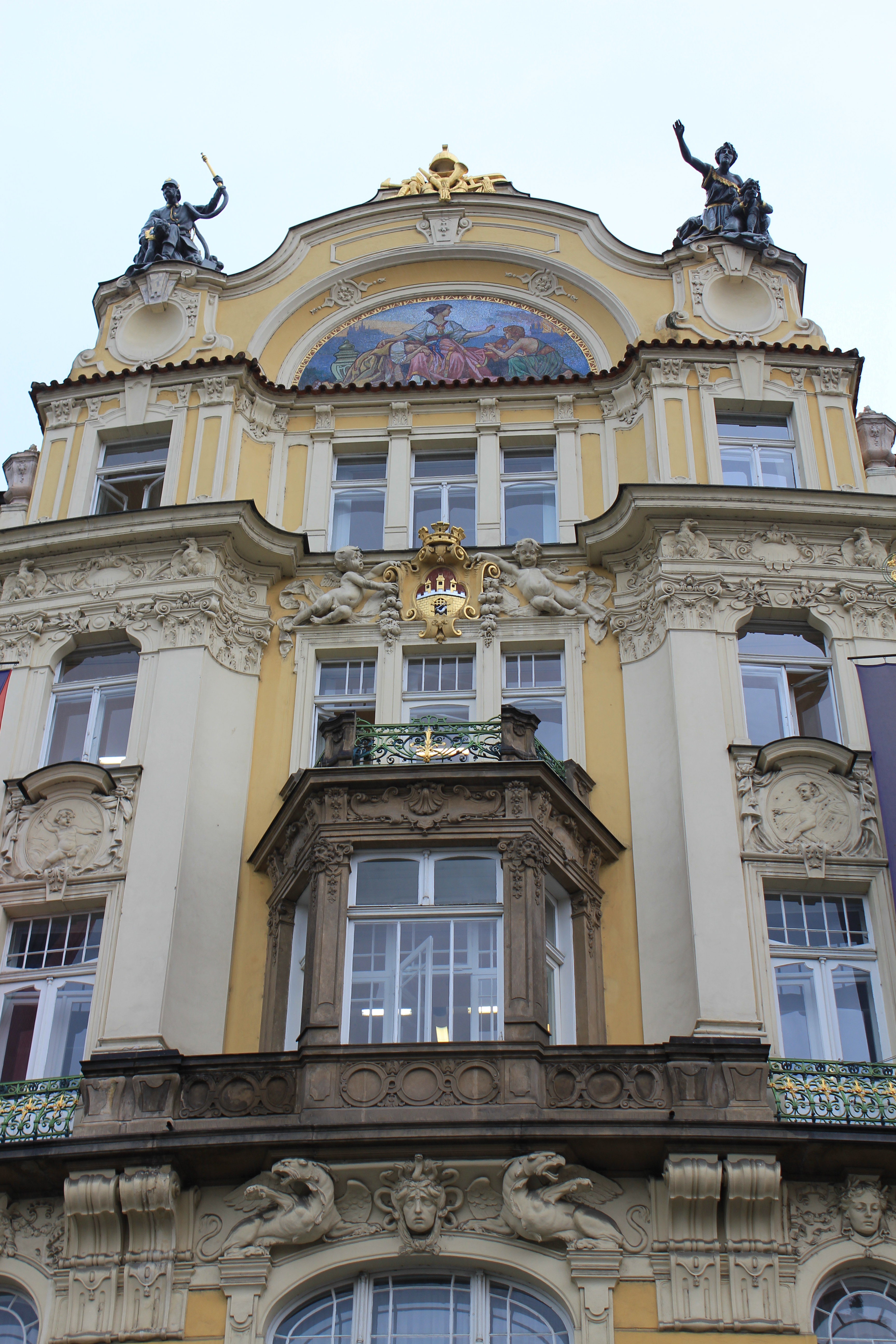 Jugend art nouveau house at Staromestiske Namesti Bytorget City Square Ministerstvo pro mistni rozvoj